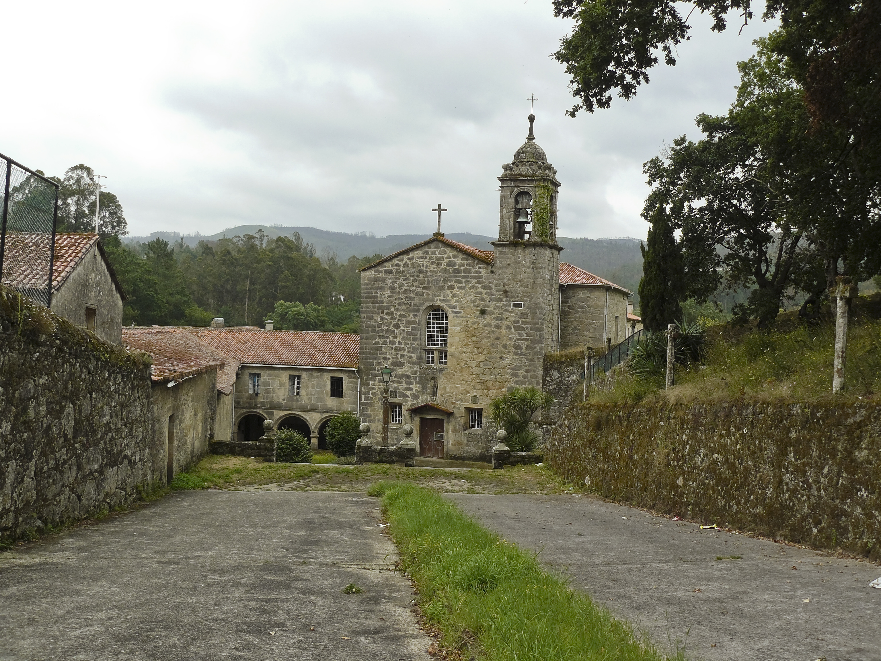 Convento de San Francisco de Herbón - Padrón - Galicia - España